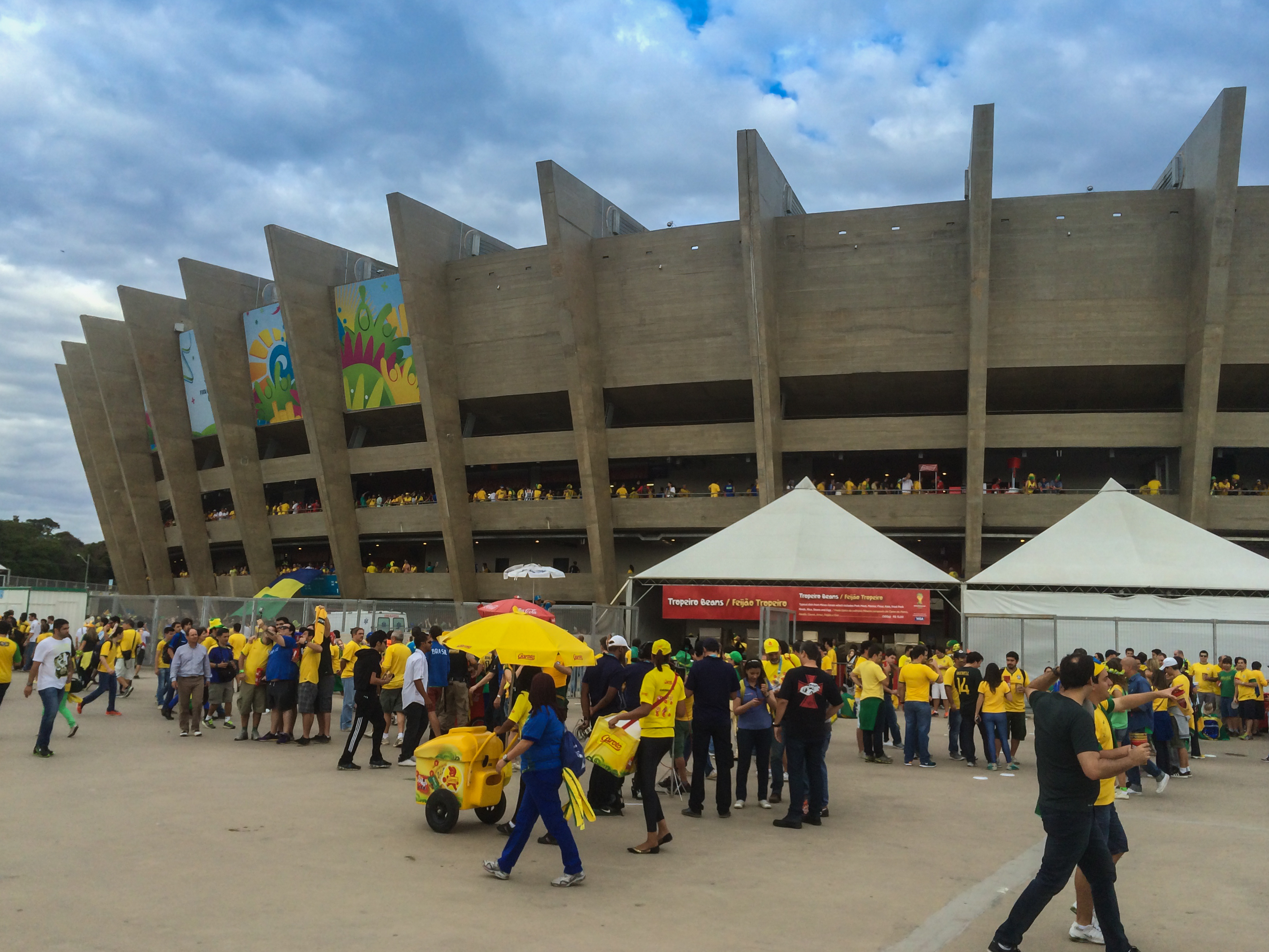 Stadion Belo Horizonte Halbfinale WM 2014